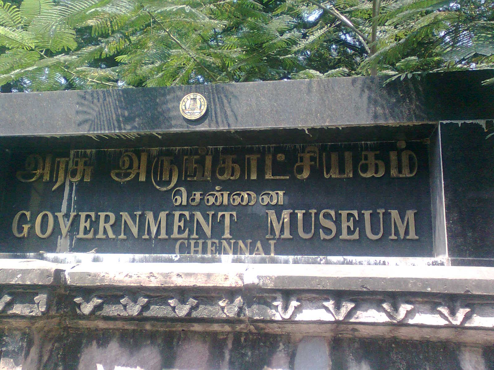 Taken at Egmore Museum